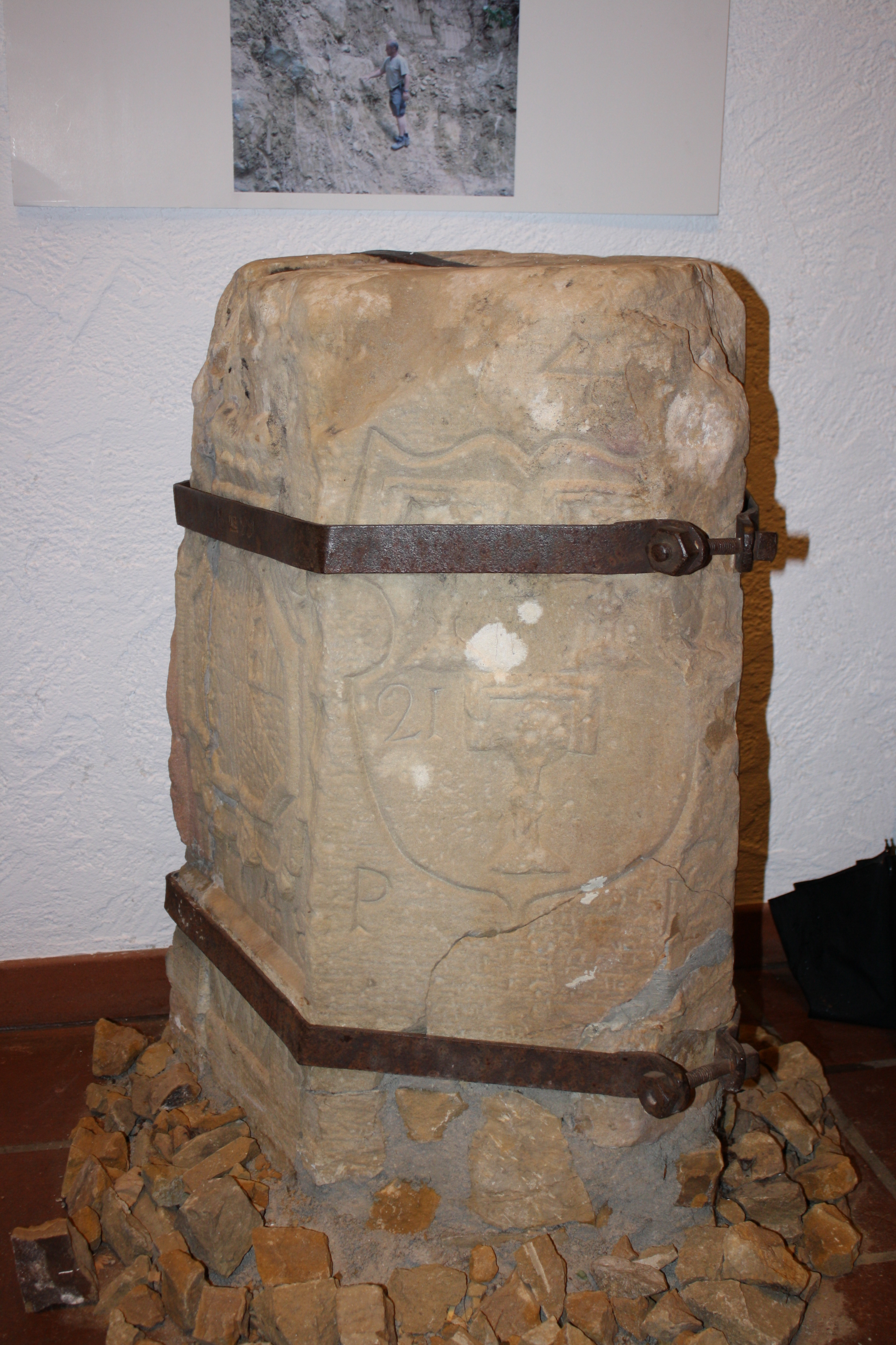 Der alte Hohbannstein im Dorfmuseum zu Pfaffenweiler. Der Stein wurde durch Frost und den Unfall mehrfach gesprengt und ist auch stark erodiert.